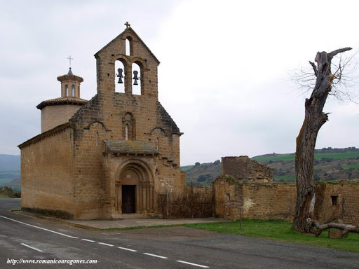 Katalain